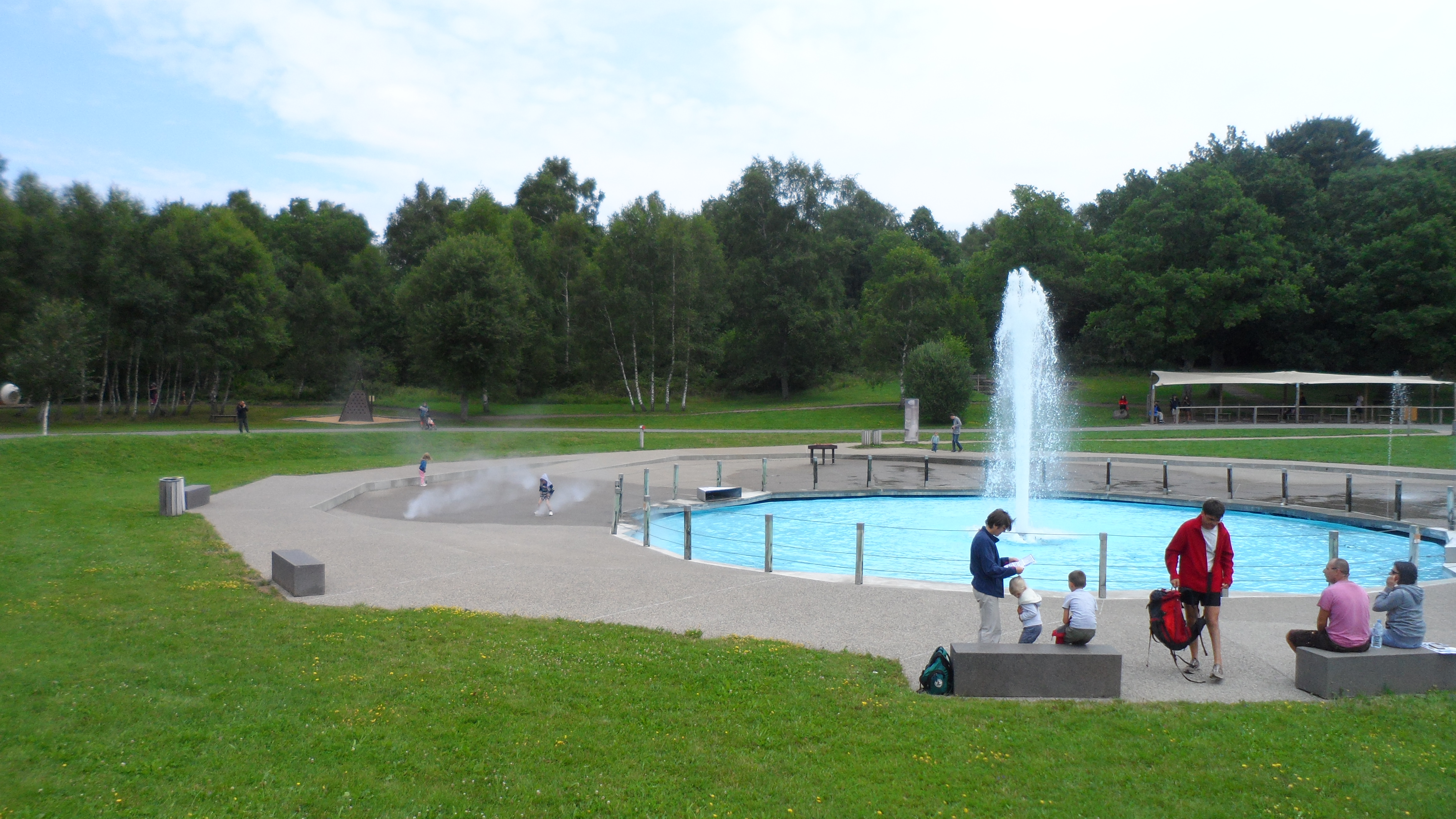 Geyser début